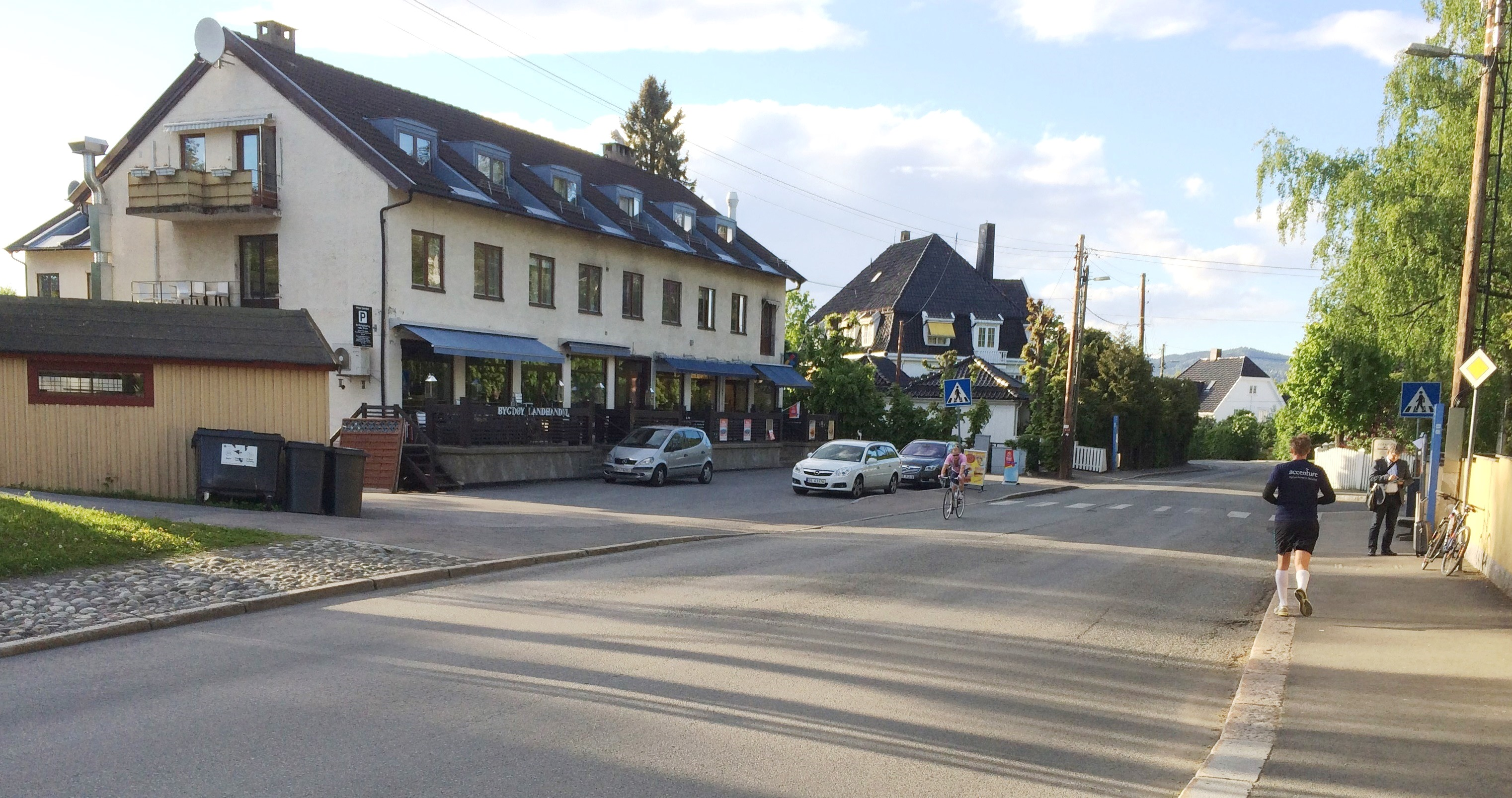 Langviksveien